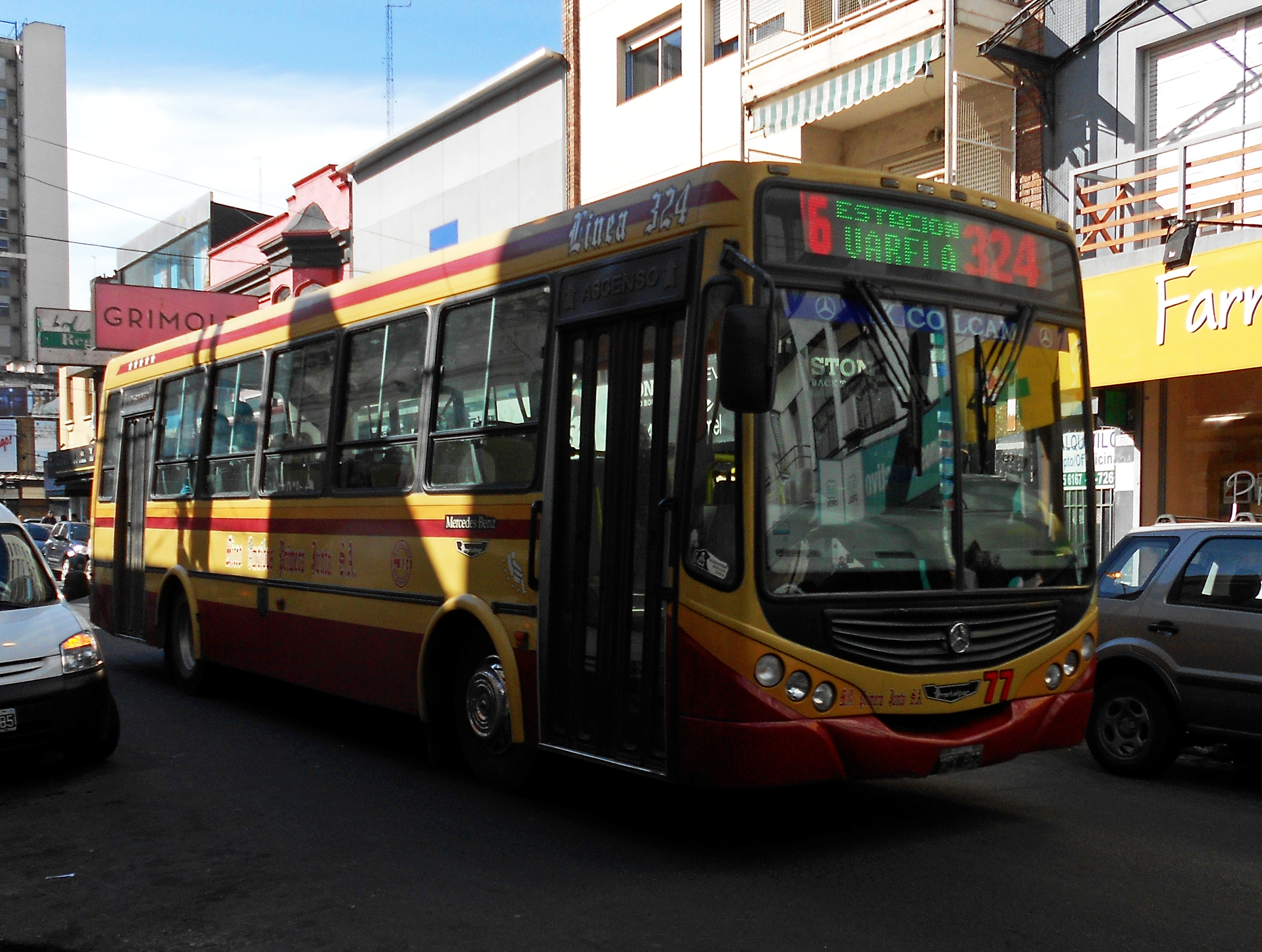 Interno de la línea 324 ramal 16, circulando por el centro de Quilmes.